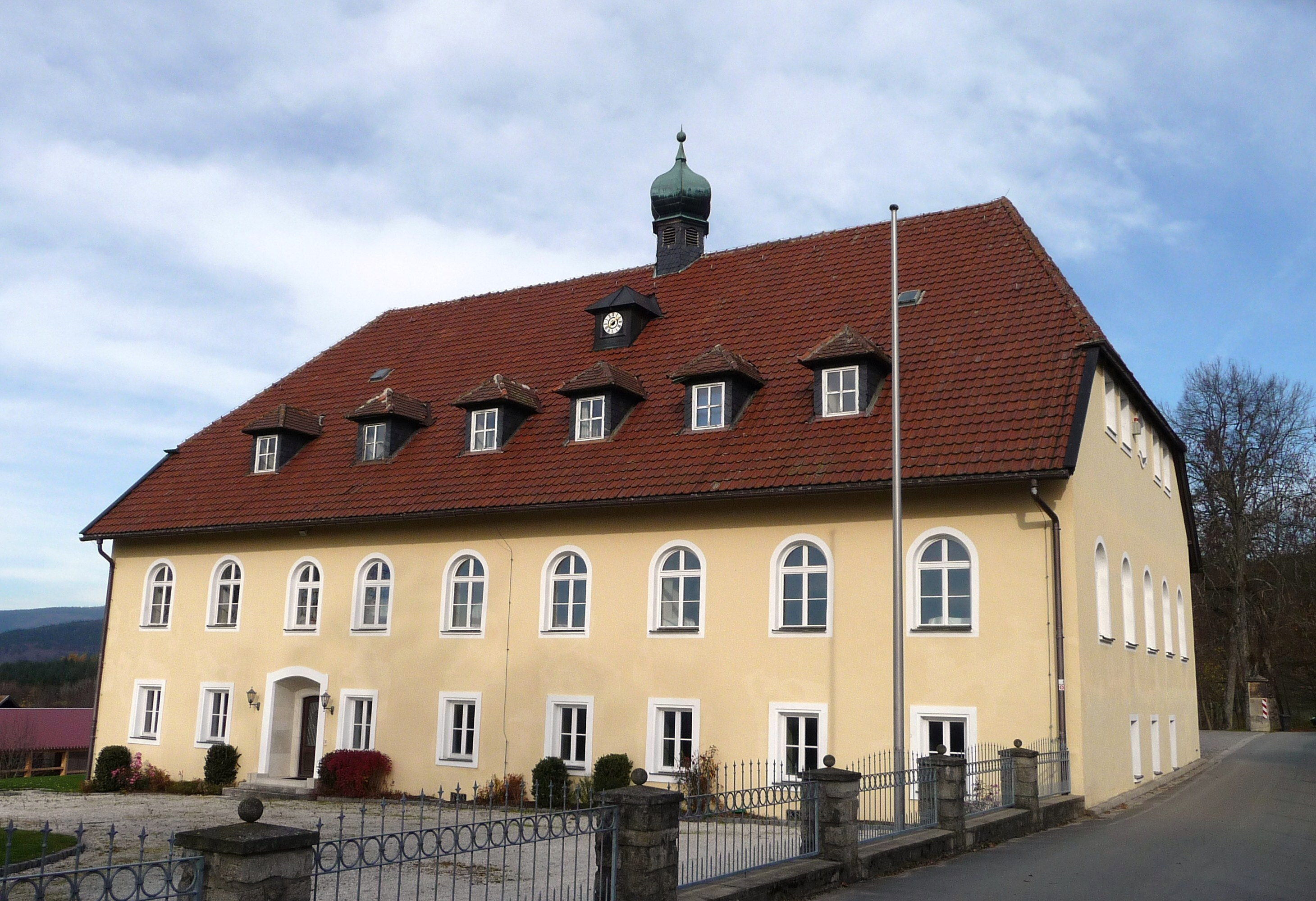 Das Herrenhaus (Altes Schloss) in Oberfrauenau